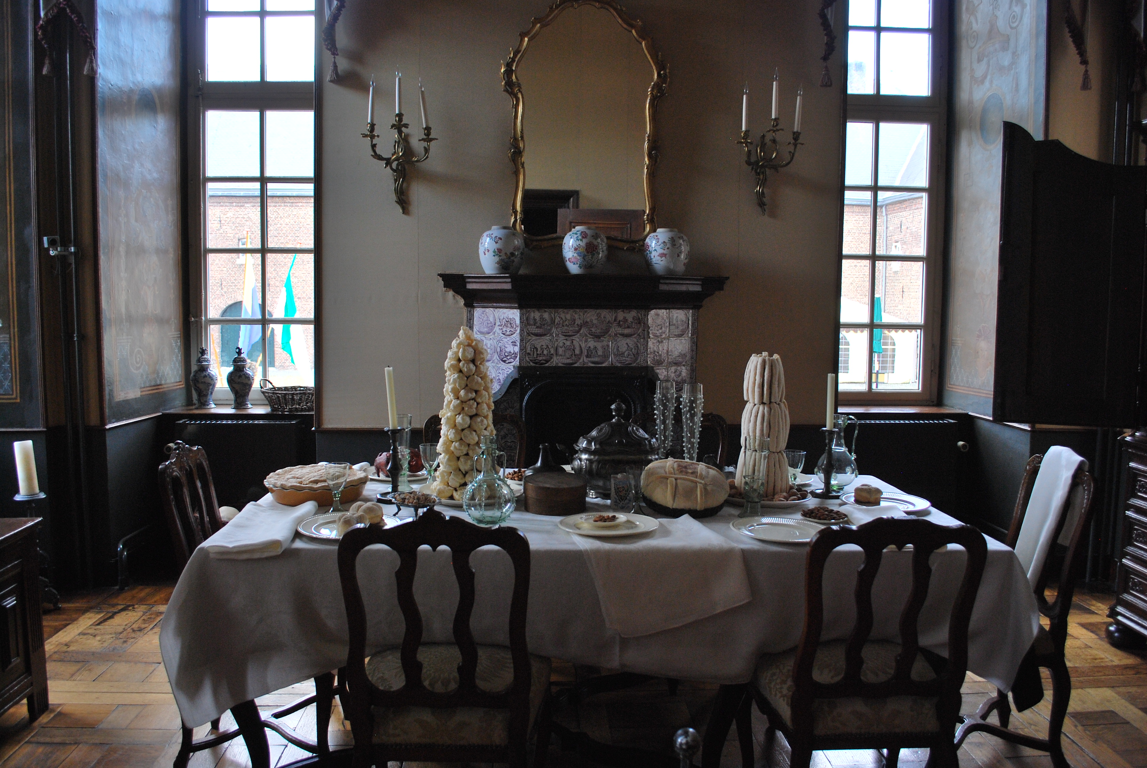 Schloss Hoensbroek, Esszimmer im Erdgeschoss des rechten Frontturms